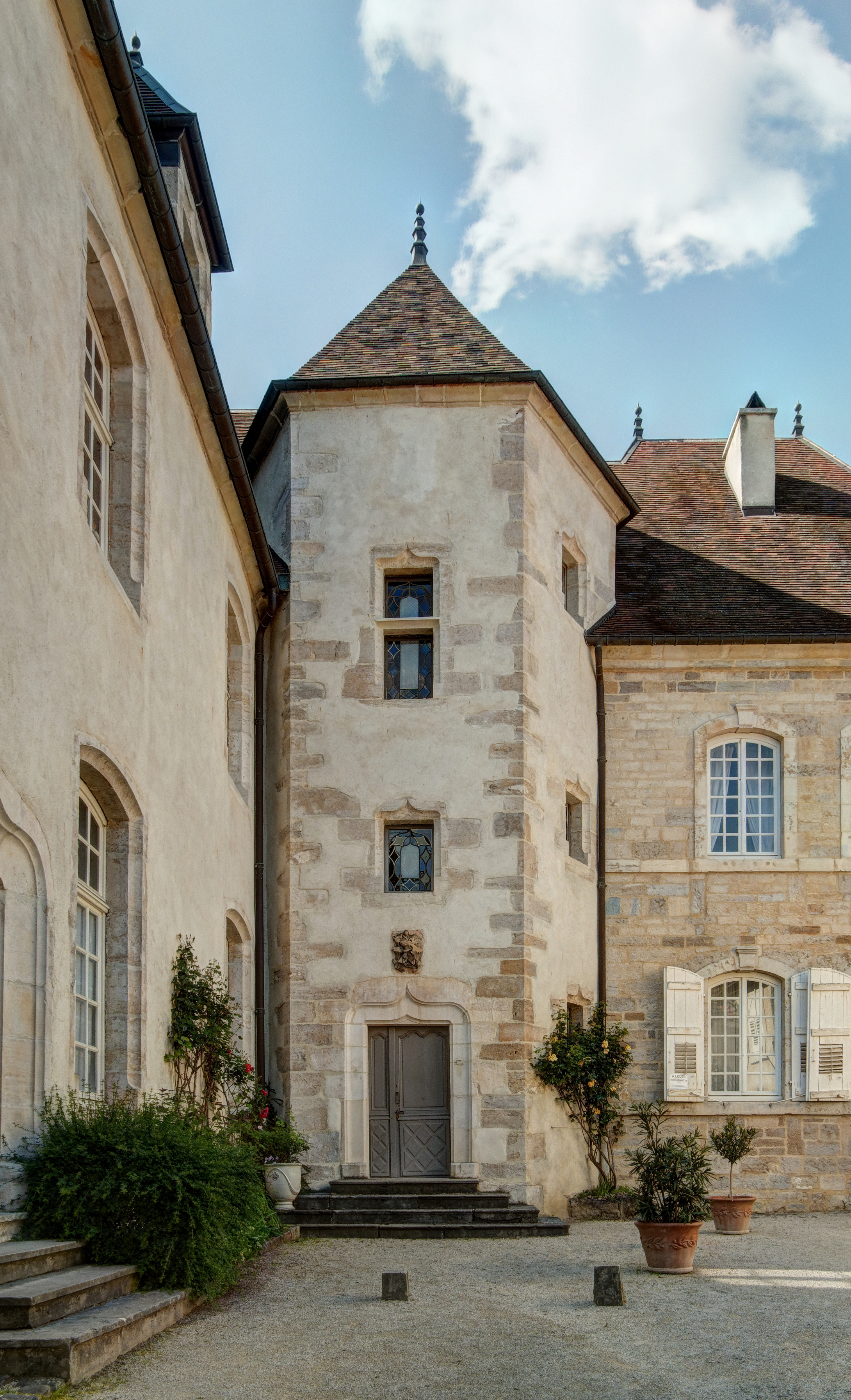 Hôtel de Magnoncourt, à Vesoul (HDR).